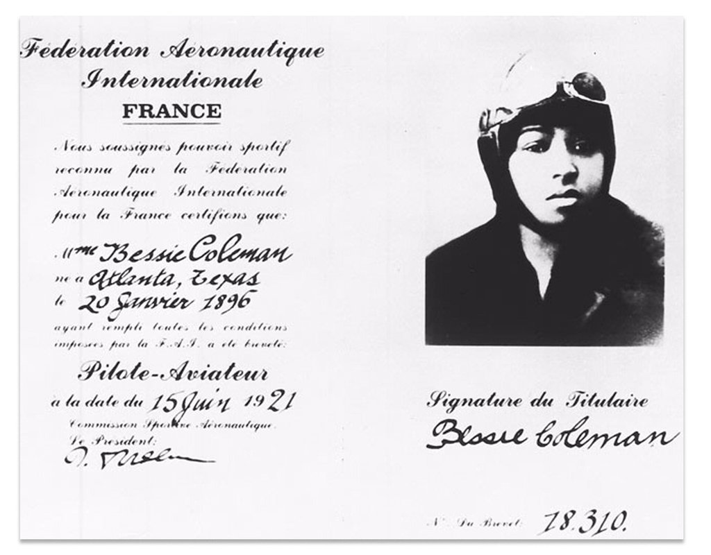 Bessie Coleman pilot’s license in 1921 from the Fédération Aéronautique Internationale.